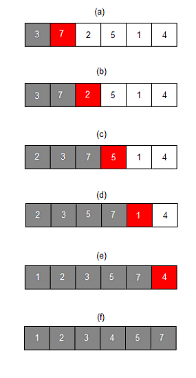 Indsættelses sortering